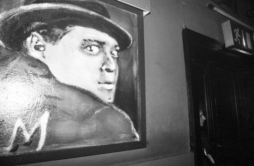 Wandmalerei im Tanzcafe LiBella